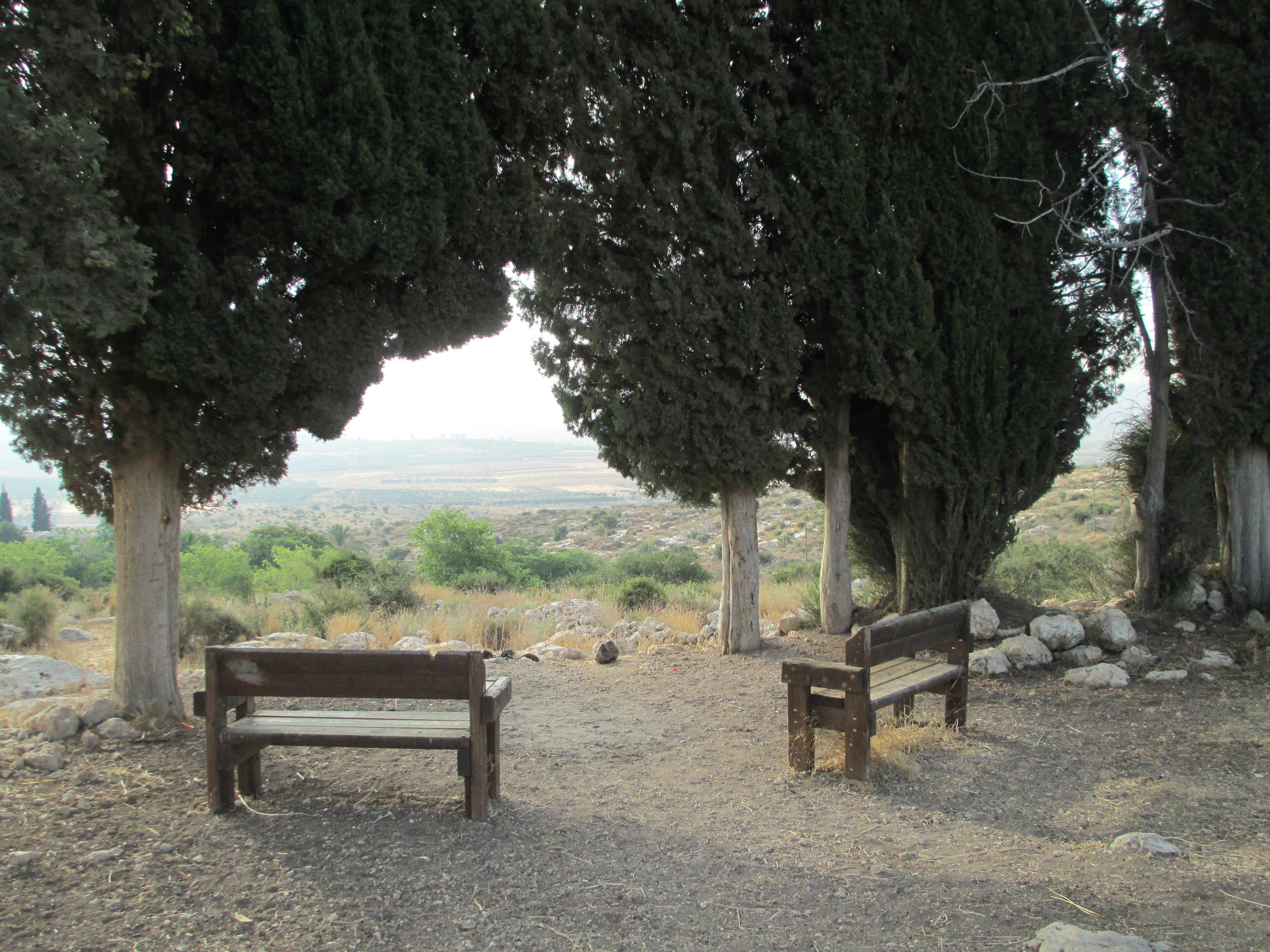 שני ספסלים בגבעת הברושים במודיעין